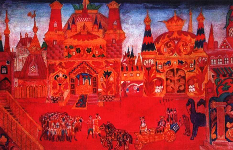 Эскиз декораций к опере Н. А. Римского-Корсакова "Золотой петушок". Антреприза С. П.Дягилева. 1914. Карандаш, акварель, белила, аппликация